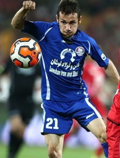 ابوذر رحیمی در دیدار فوتبال پرسپولیس و داماش گیلان